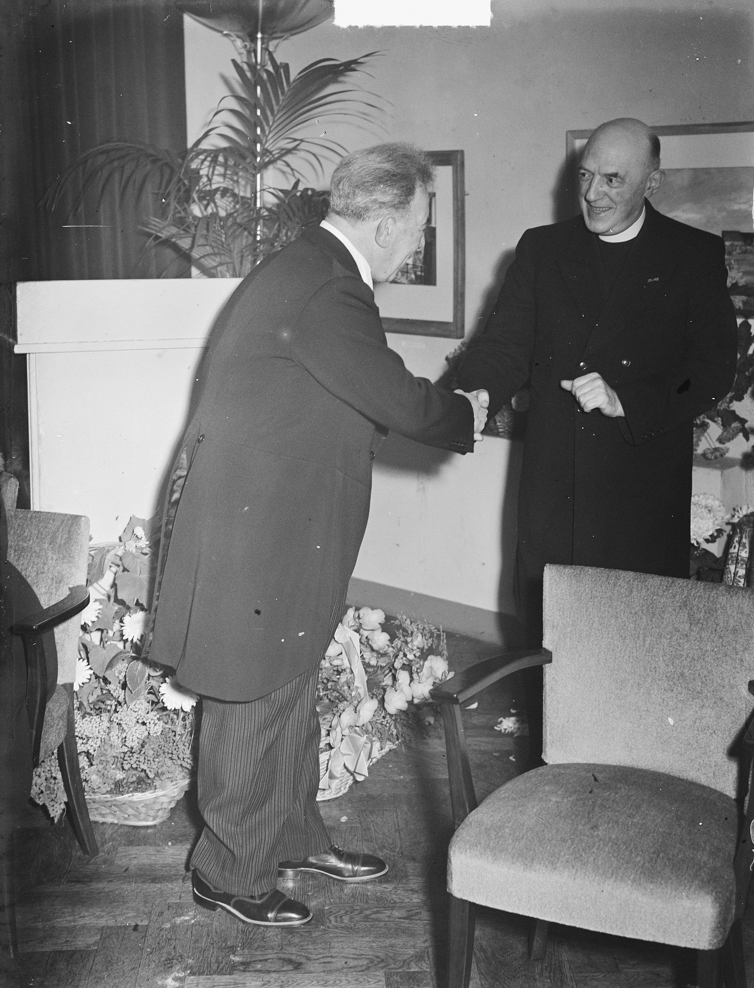 Collectie / Archief : Fotocollectie Anefo Reportage / Serie : [ onbekend ] Beschrijving : Albert van Raalte receptie 40 jaar dirigent Datum : 31 oktober 1950 Trefwoorden : dirigenten, recepties Persoonsnaam : Albert van Raalte Fotograaf : Pot, Harry / Anefo Auteursrechthebbende : Nationaal Archief Materiaalsoort : Glasnegatief Nummer archiefinventaris : bekijk toegang 2.24.01.09 Bestanddeelnummer : 904-2701